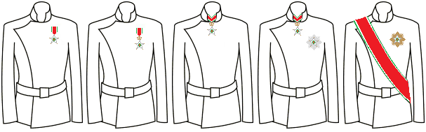 Modi di indossare le insegne dell'Ordine Coloniale della Stella d'Italia (Regno d'Italia)